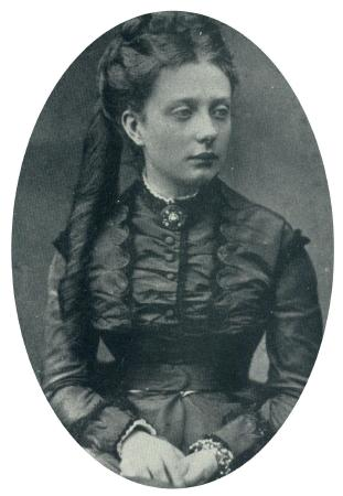 Maria Antonietta delle Due Sicilie, moglie di Alfonso di Borbone-Due Sicilie, conte di Caserta.